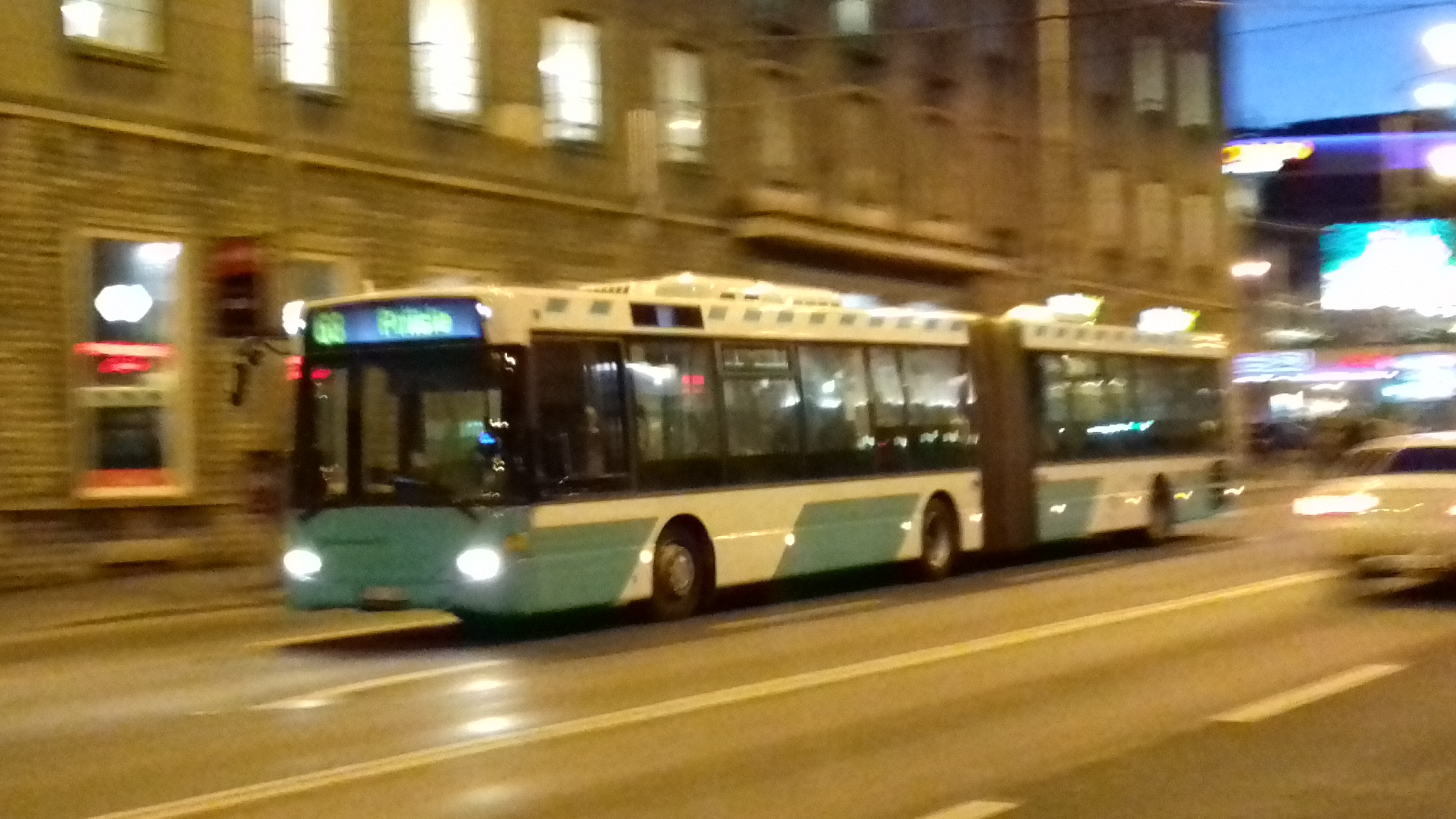 Scania OmniLink CL94UA 6X2LB sõitmas Estonia puiesteel 68. liinil. Rootsist toodud veel kaks sellist bussi.